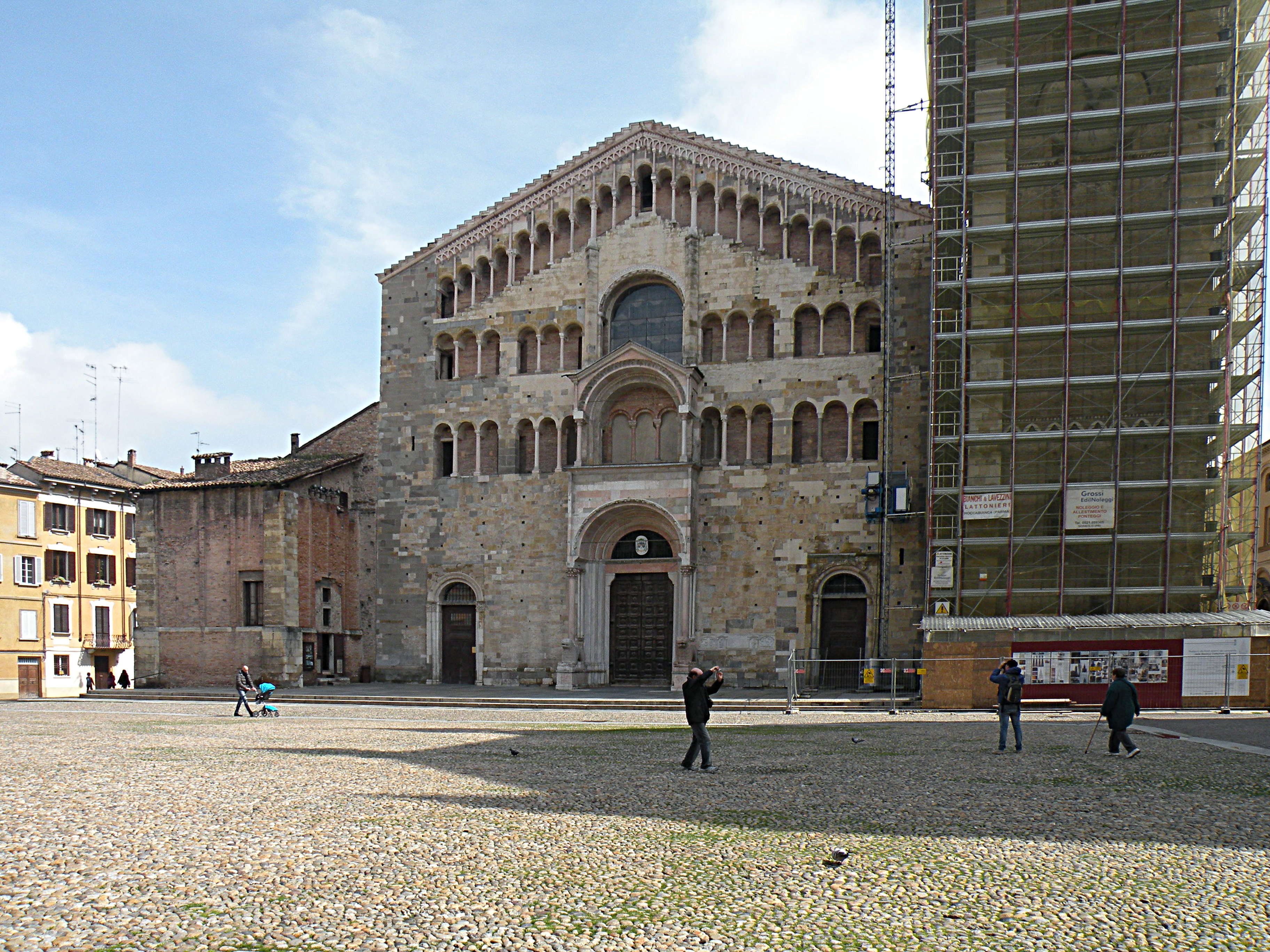 Собор в Парме (Фасад)